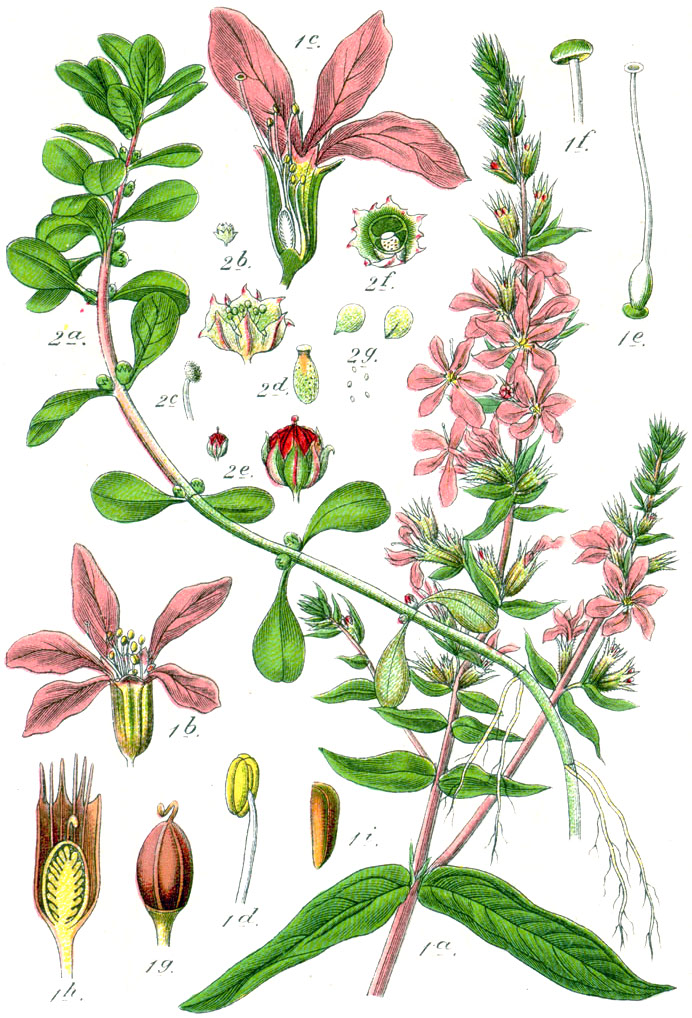 1. Lythrum salicaria L. 2. Peplis portula L. Original Caption 1. Blutkraut, Lythrum salicaria 2. Portel, Peplis portula